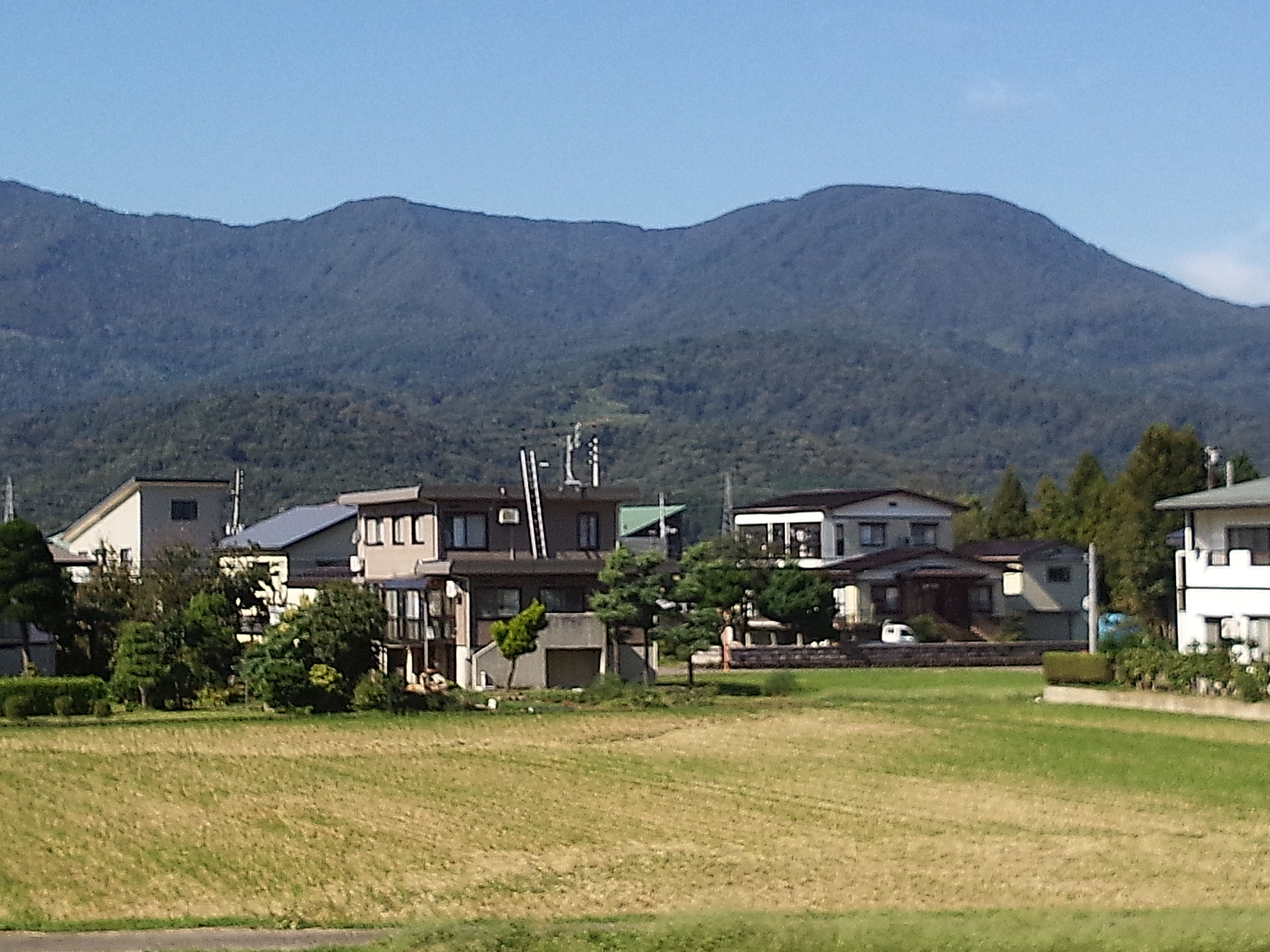 鮫ヶ尾城遠景